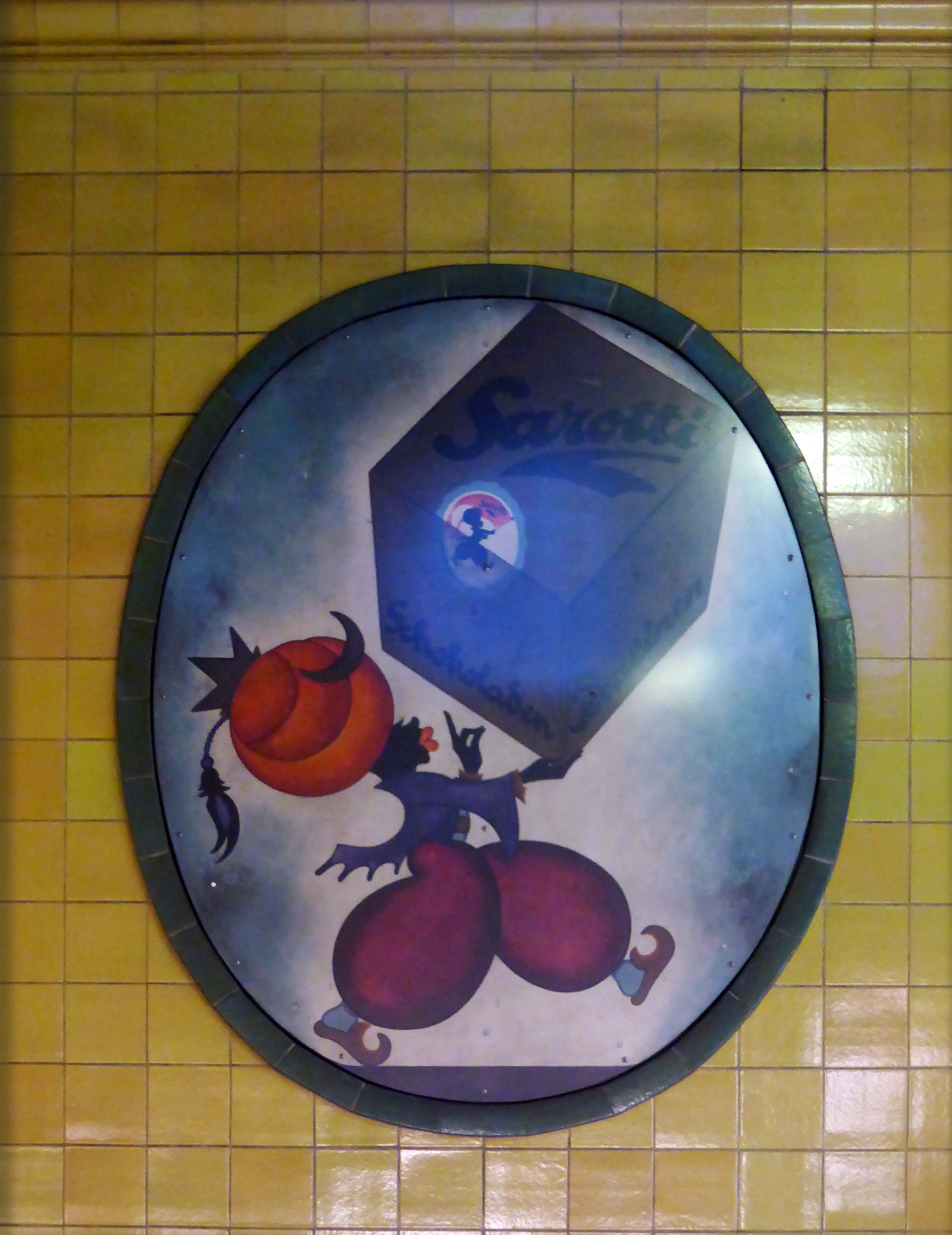 Werbefläche (Sarotti) im U-Bahnhof Wittenbergplatz, Berlin.